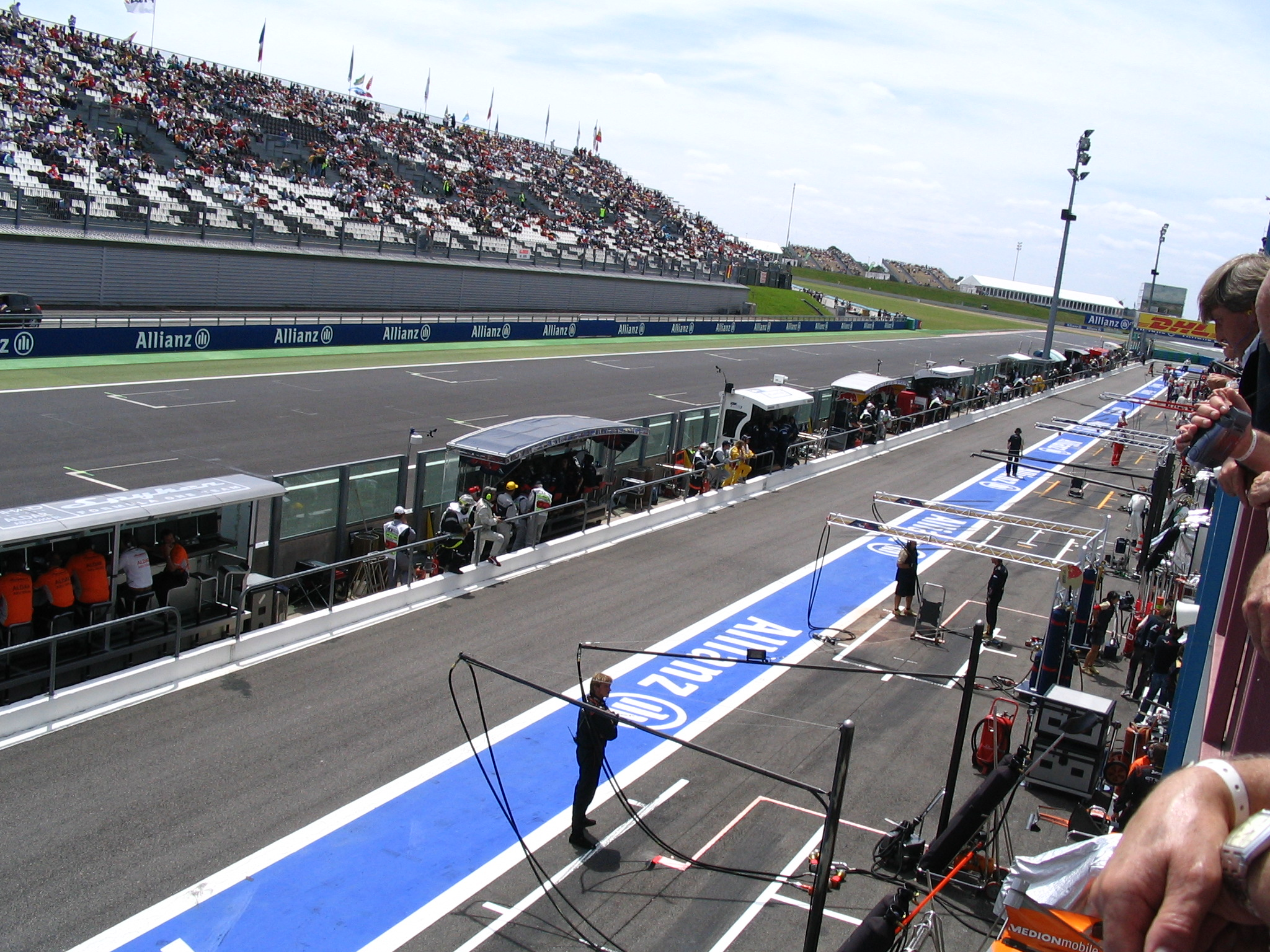 Circuit de Magny Court, France